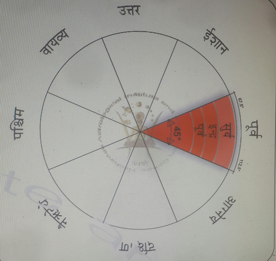 directional diagram of east direction